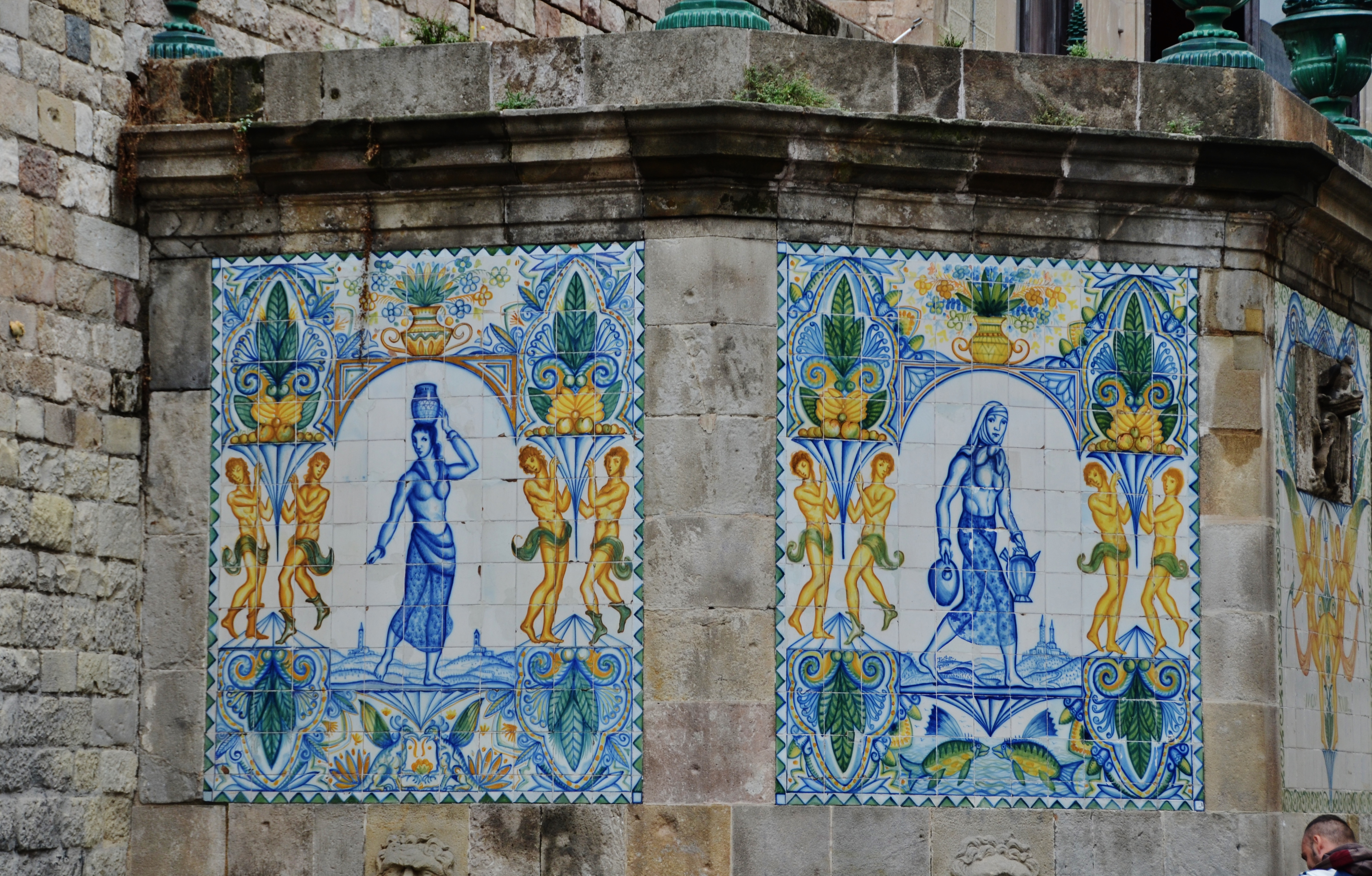 Font Gòtica (Font de Santa Anna) Portal de l'Àngel, Barri Gòtic, Barcelona